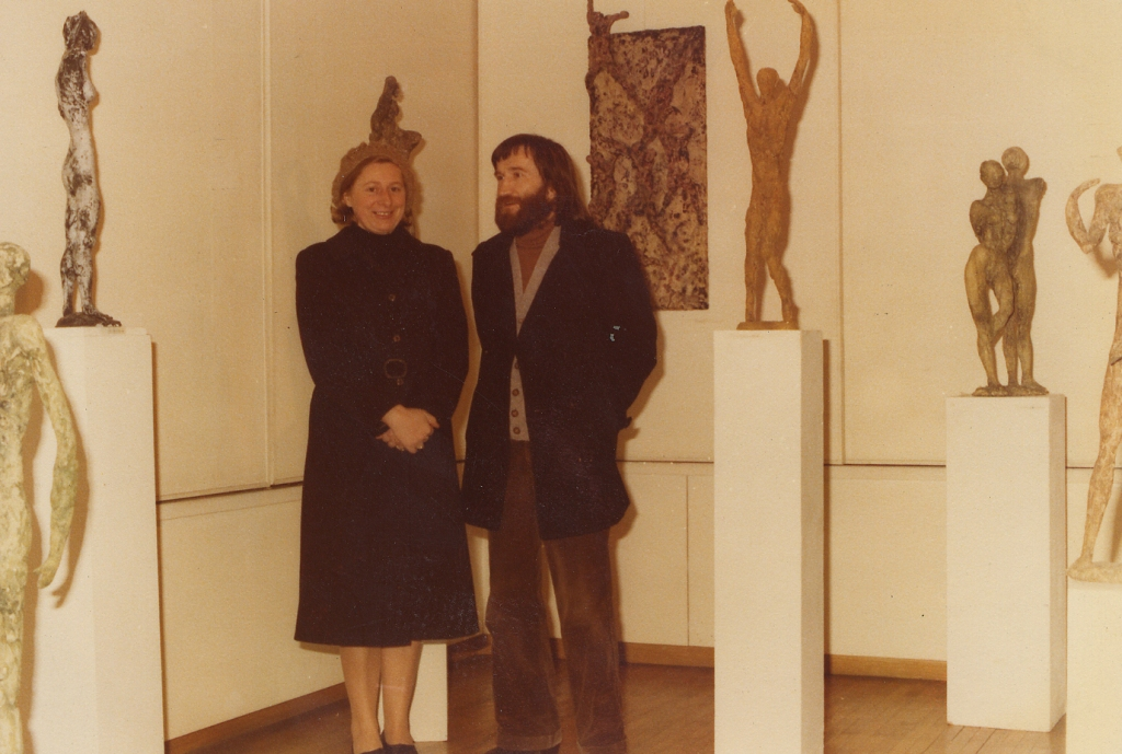 Josip konta sa suprugom Marijom 1980-ih